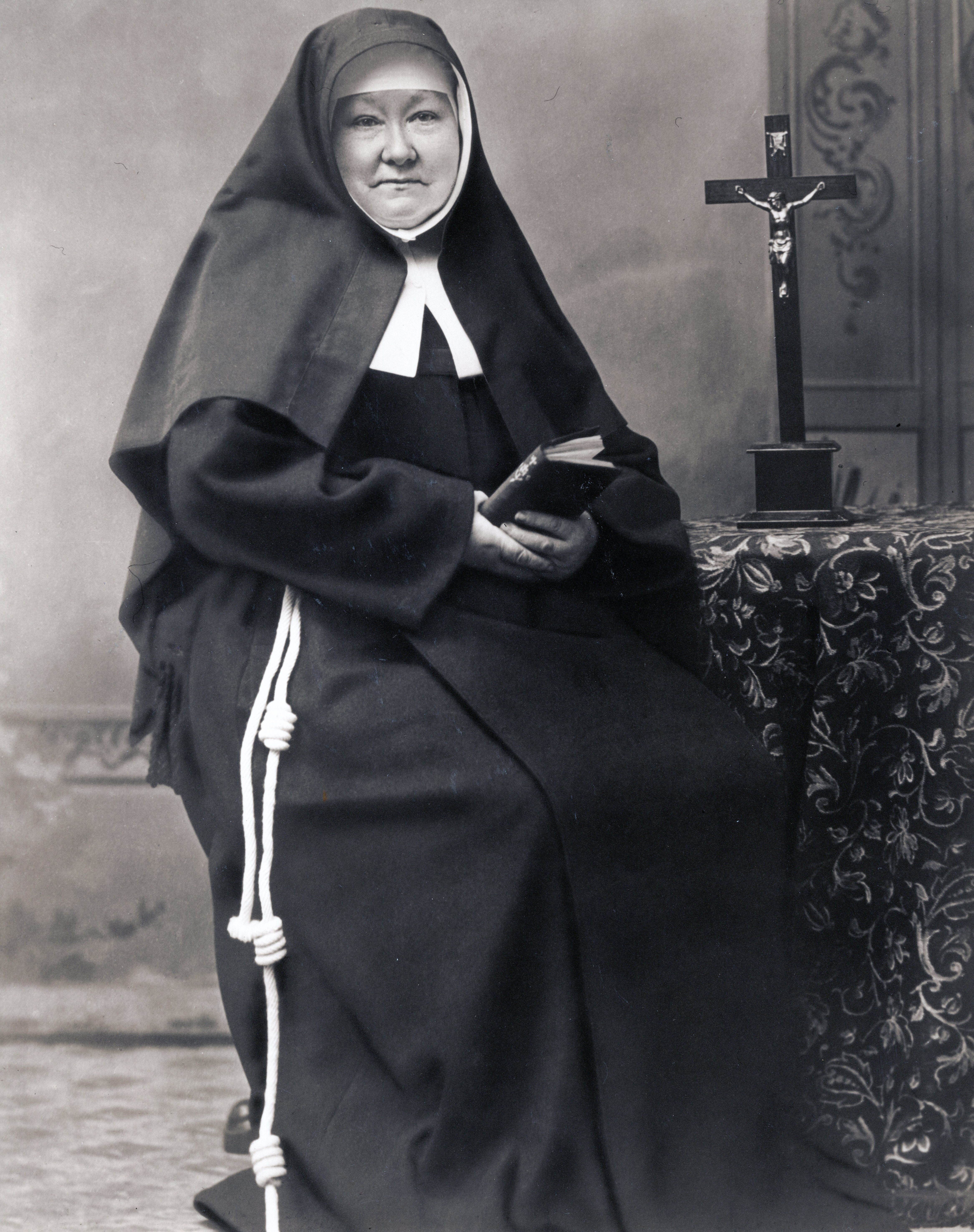 Фотография Марии Терезии Святых Даров Бонзель, в миру Вильгельмины Бонзель (1830 - 1905), основательницы Конгрегации бедных сестёр-францисканок непрестанной адорации, блаженной Римско-католической церкви.